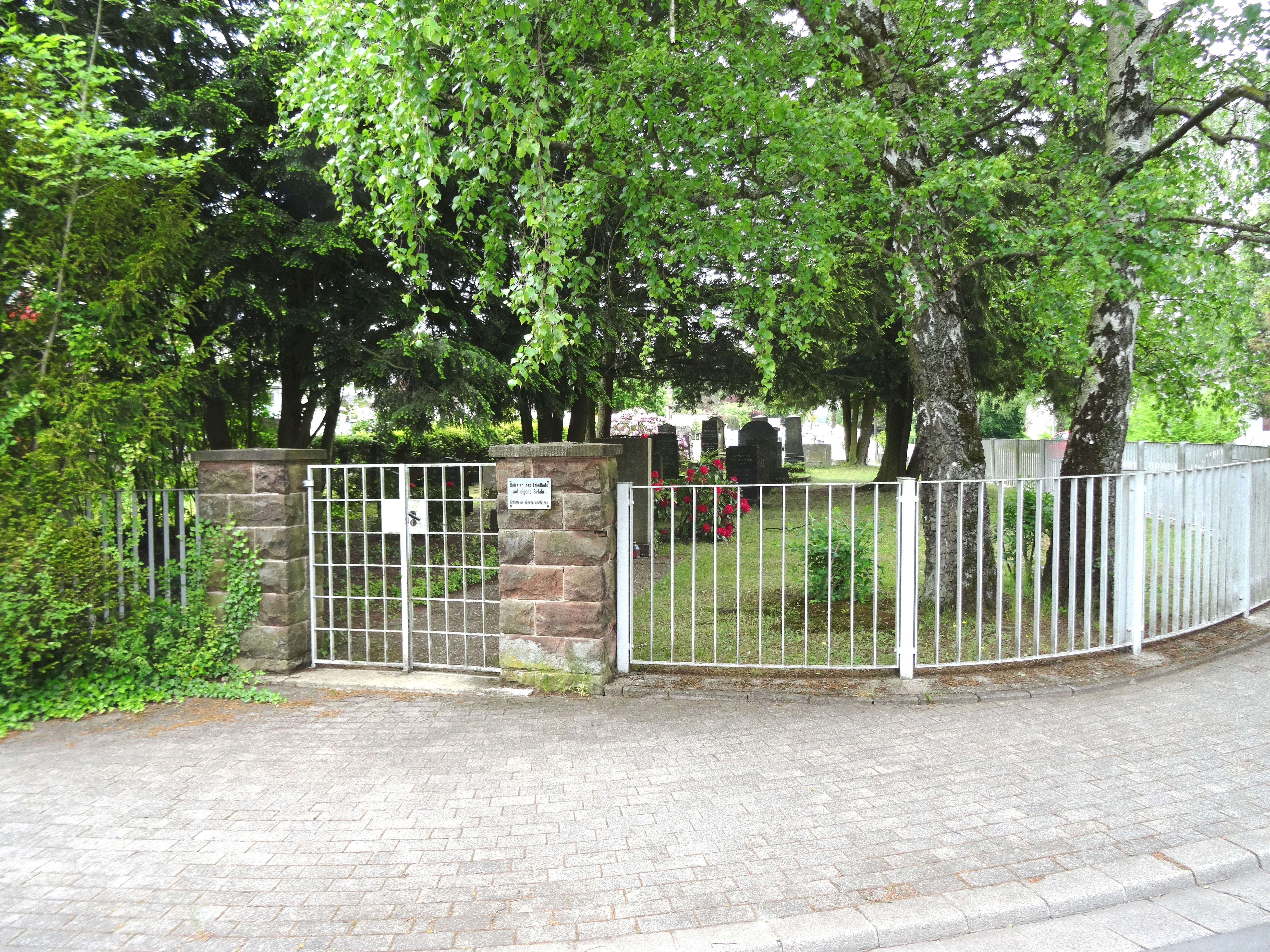 Alter jüdischer Friedhof in St. Ingbert